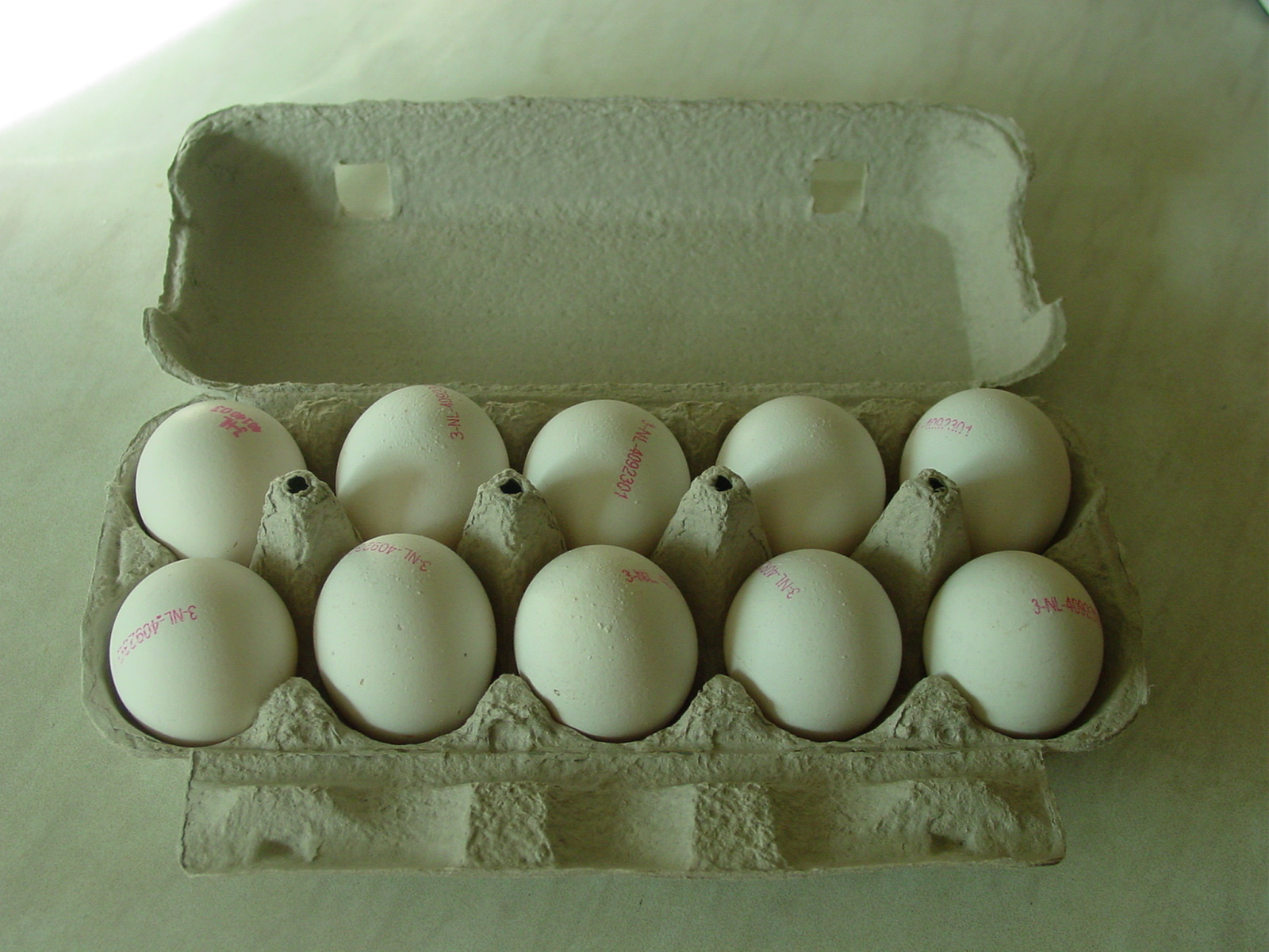 Chicken Eggs